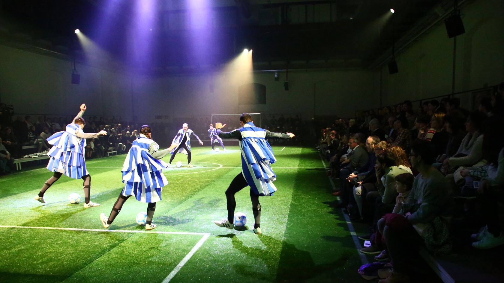 Otsailak 09 | 18:00 & 20:00 | Tabakalera Patio Kukai Dantzak eta Realak bat egin dute Kirol legez / Fair Play ikuskizuna sortu eta bereziki Korner jaialdian aurkezteko. Zubieta eta Niessen faktorien emaitza berria da dantza ikuskizun hau. Taldelanean eta harrobian oinarrituta, kirol-legez. Antolatzaileak: Real Sociedad Fundazioa, Donostia Kultura Argazkiak / Fotos: Real Sociedad